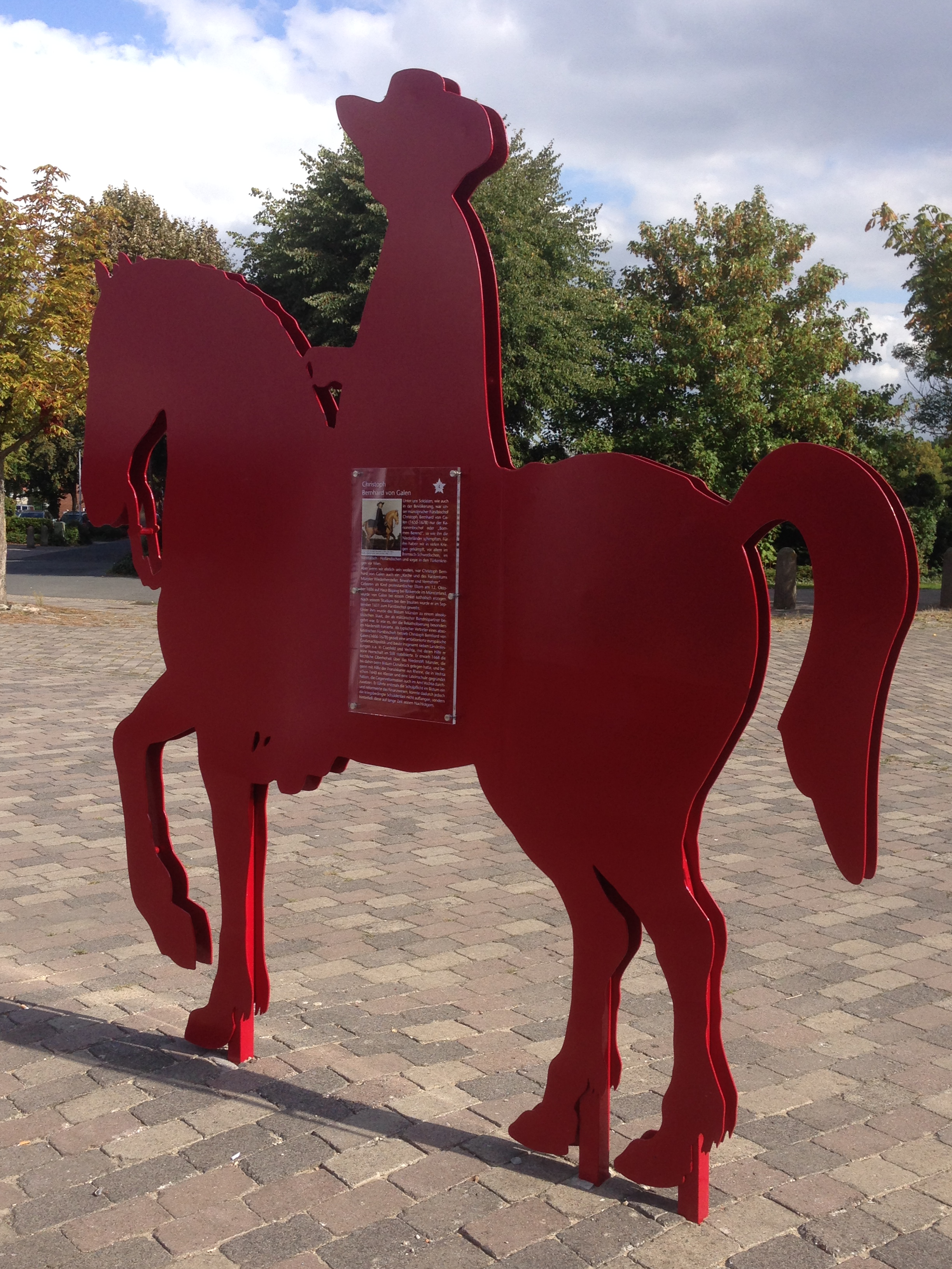 Eisenskulptur mit der Silhouette von Christoph Bernhard von Galen auf dem Vorplatz des Zeughauses der Zitadelle Vechta